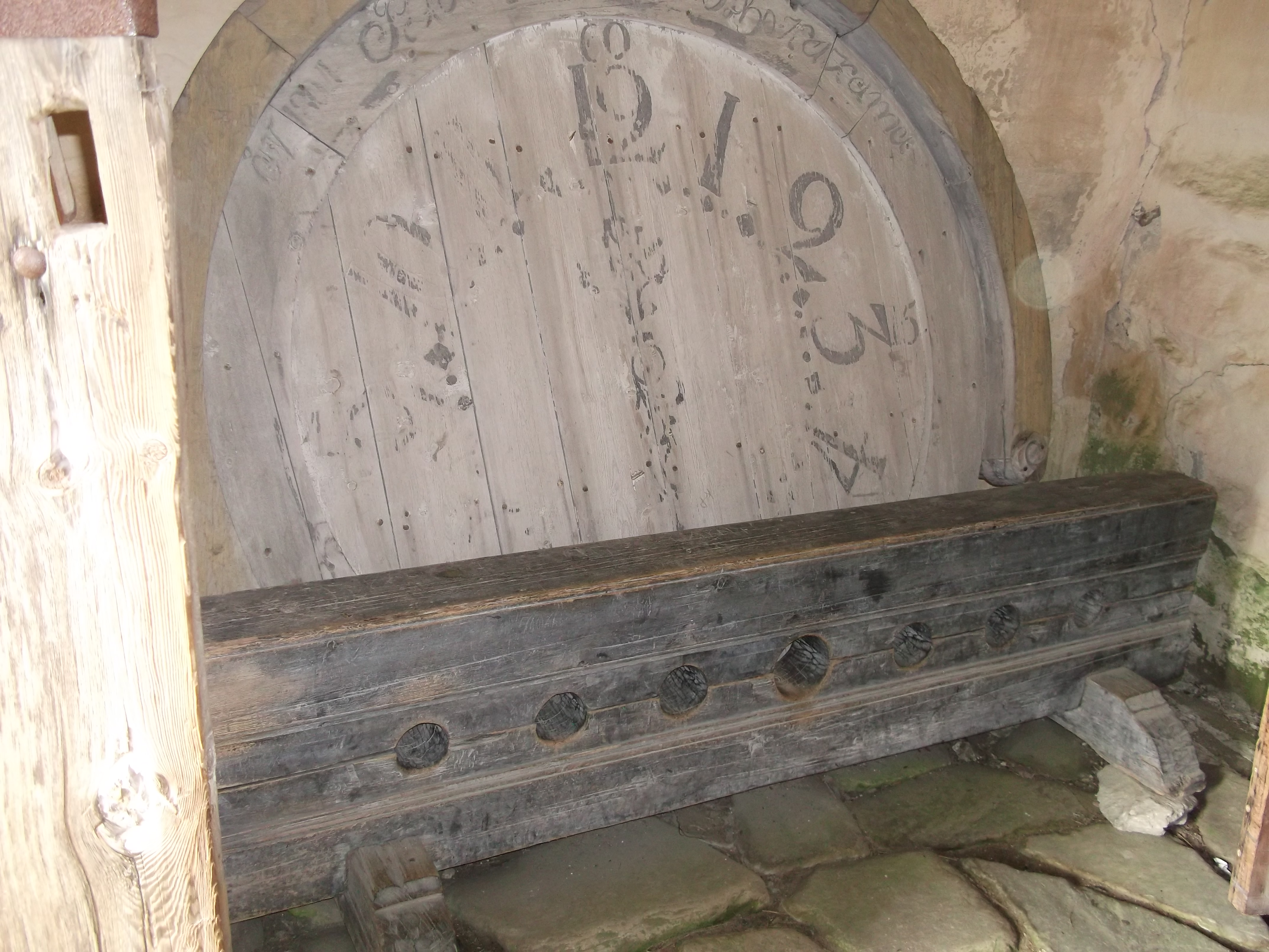 Miehille varattu häpeäpuu Pyhän Mikaelin kirkon porstuassa Keminmaassa